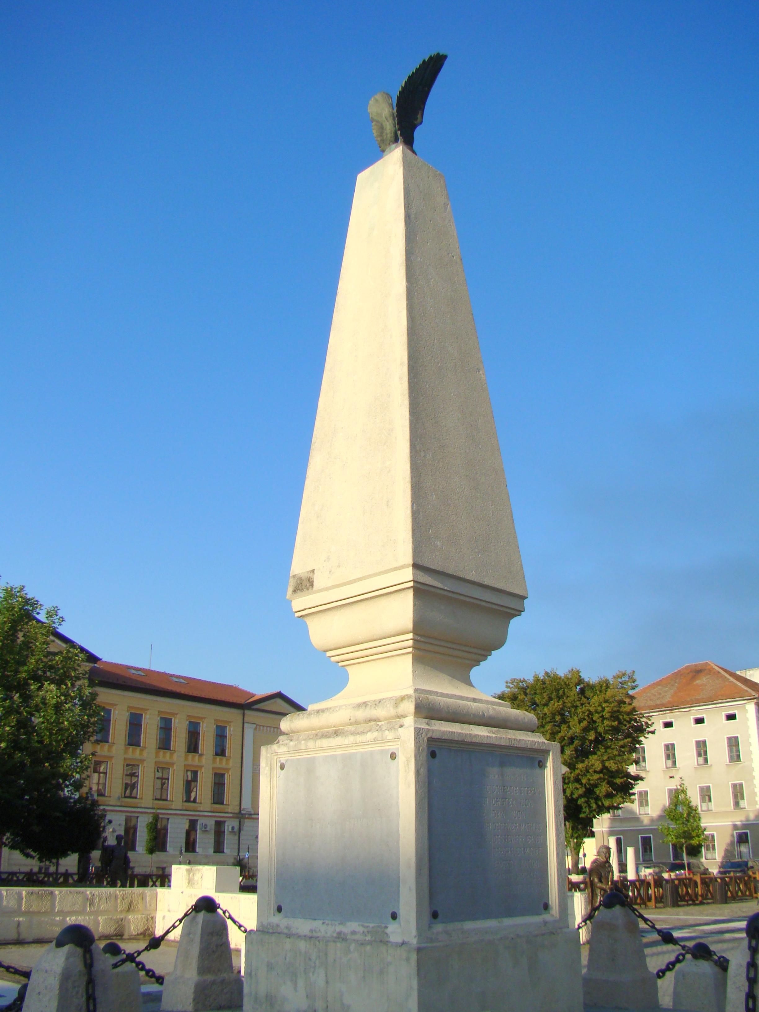 Obeliscul închinat eroilor din Regimentul 50 infanterie căzuți în lupta de la Custozza în 1866, municipiul Alba Iulia